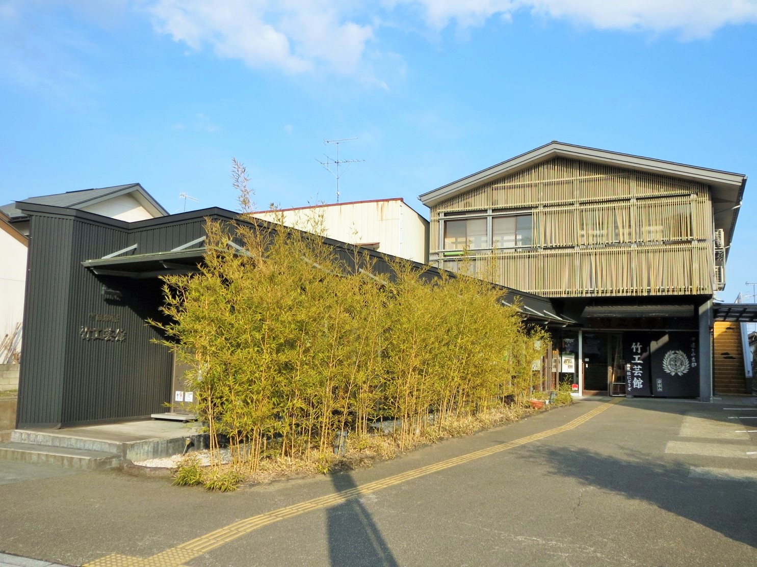 大崎市にある竹工芸館 Canon IXY 3